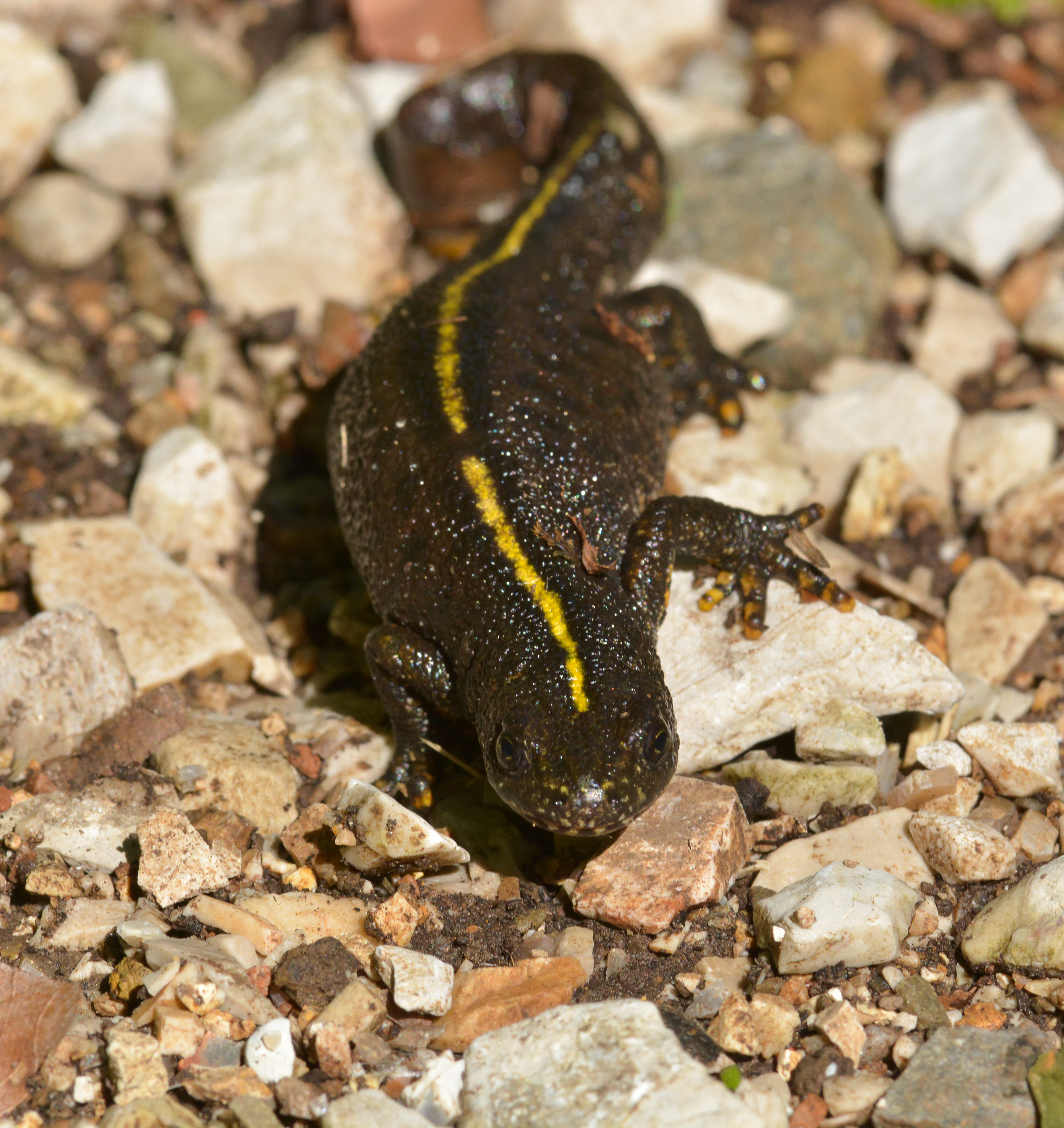 Tritone crestato (Triturus carnifex) presso il lago di Ospedaletto (lago Minisini) Ospedaletto Gemona del Friuli